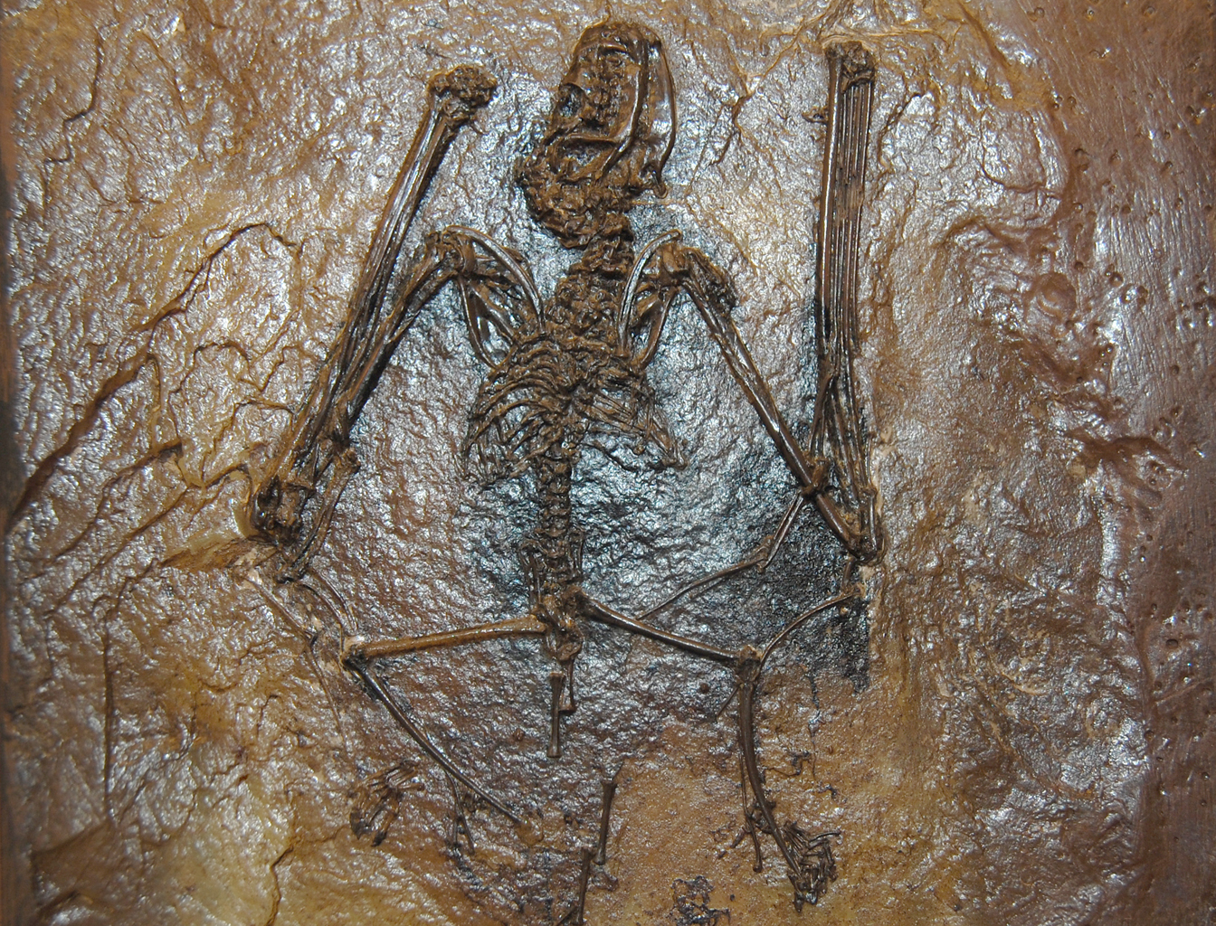 Naturhistorisches Museum Wien